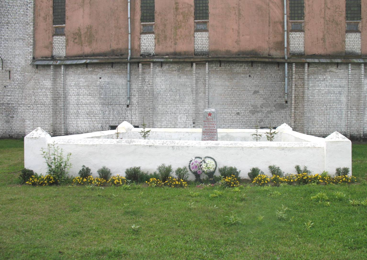 Памятник на месте расстрела евреев поселка Плещеницы Логойского района во время Холокоста.